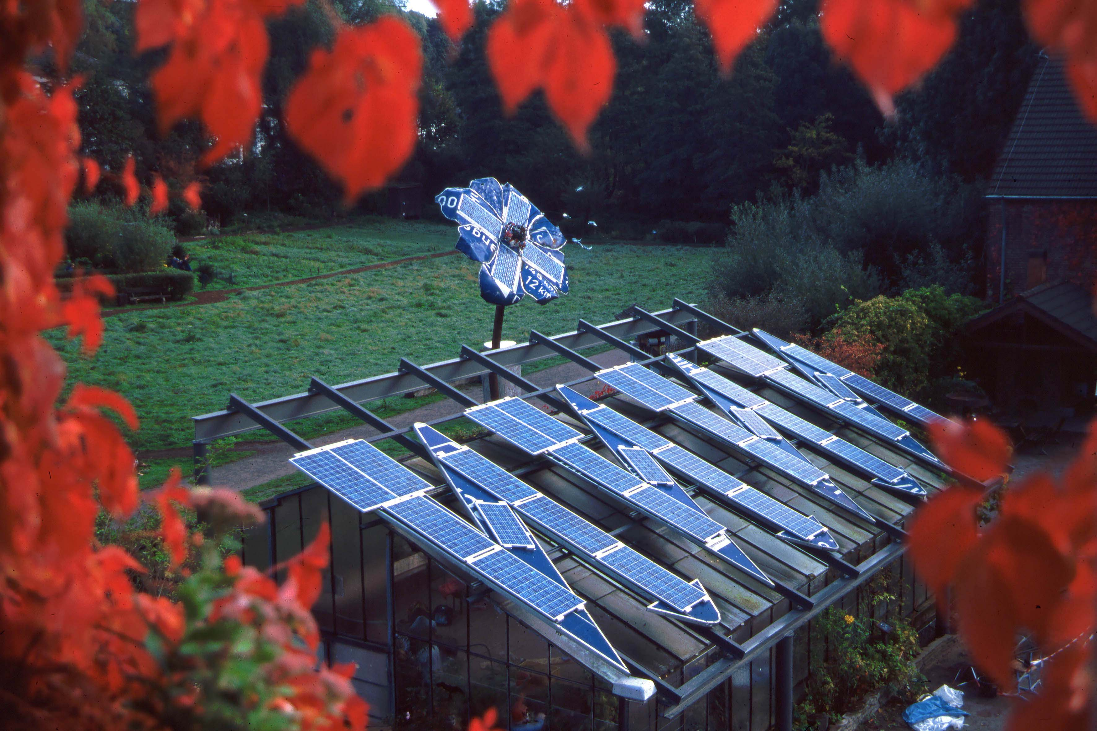 Blick auf das Gewächshaus von NaturGut Ophoven mit Solarinstallationen